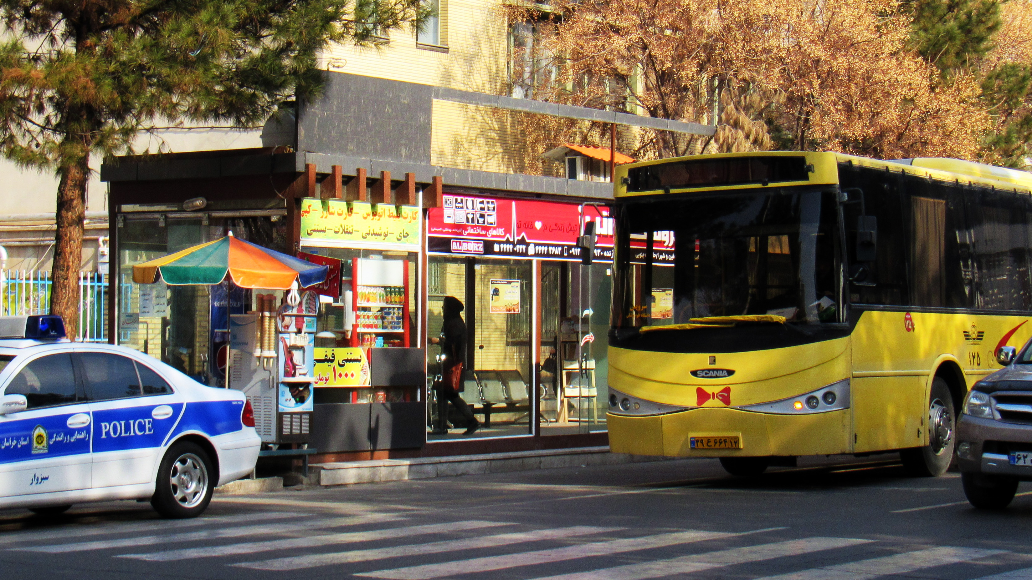 ایستگاه اتوبوس چهارراه دادگستری سبزوار